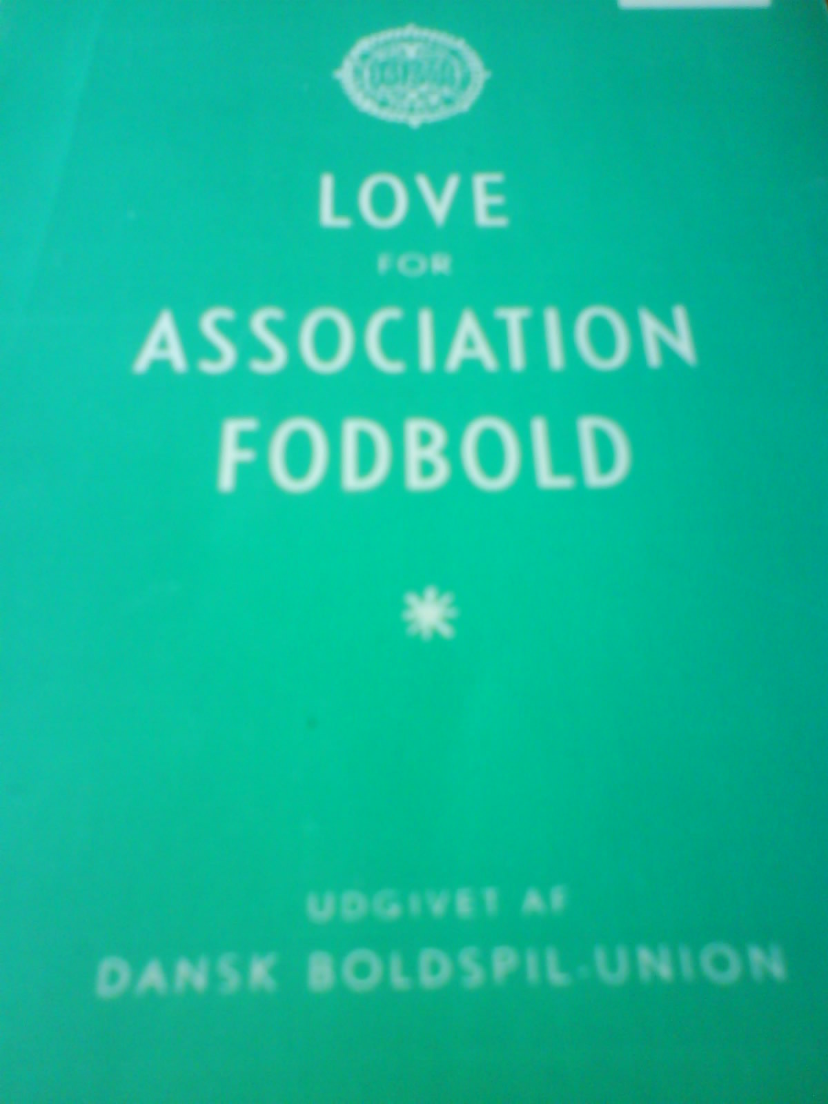 DBUs officielle fodboldlov fra 1977